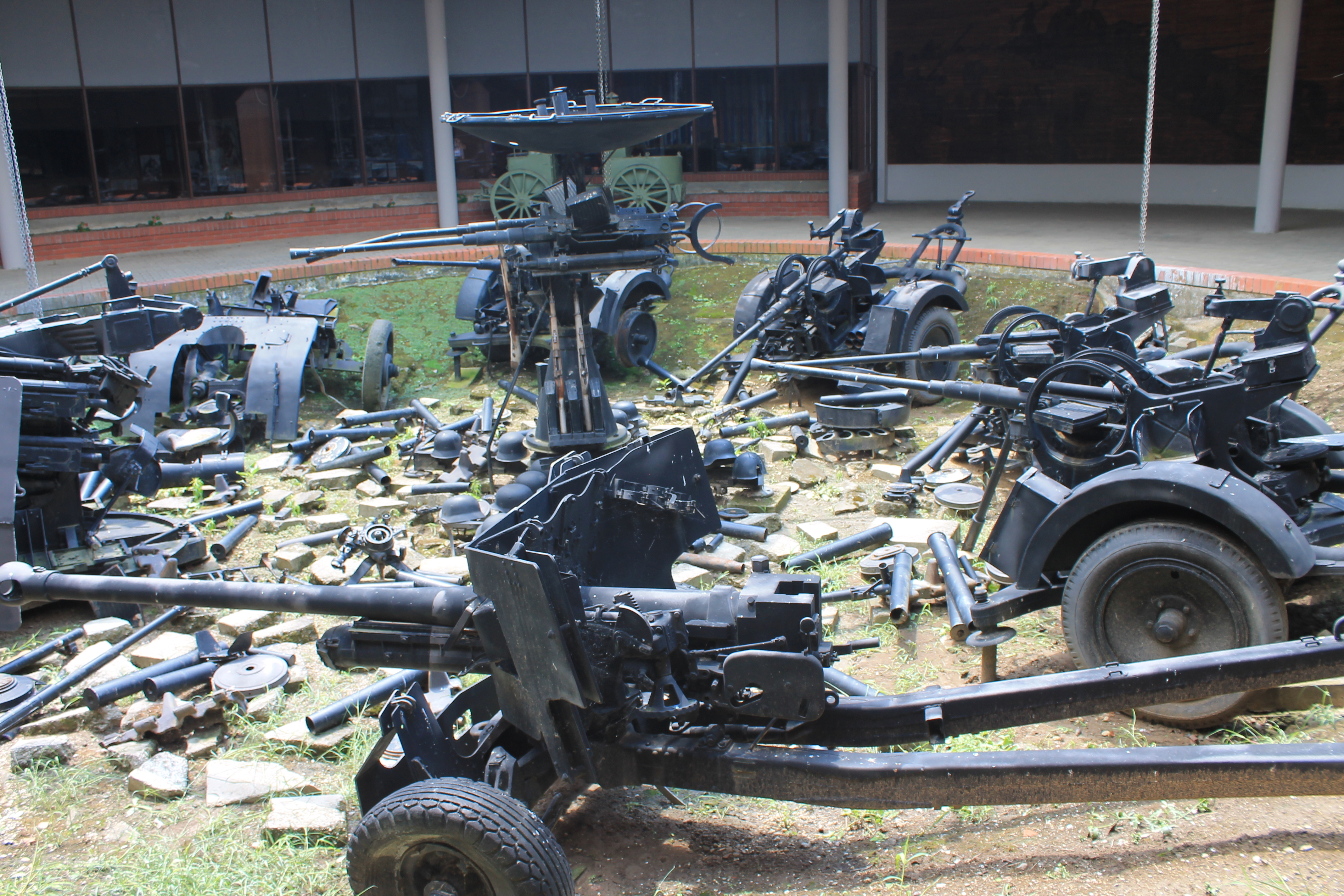 Spomen-obeležje Sremski front, jun 2018.